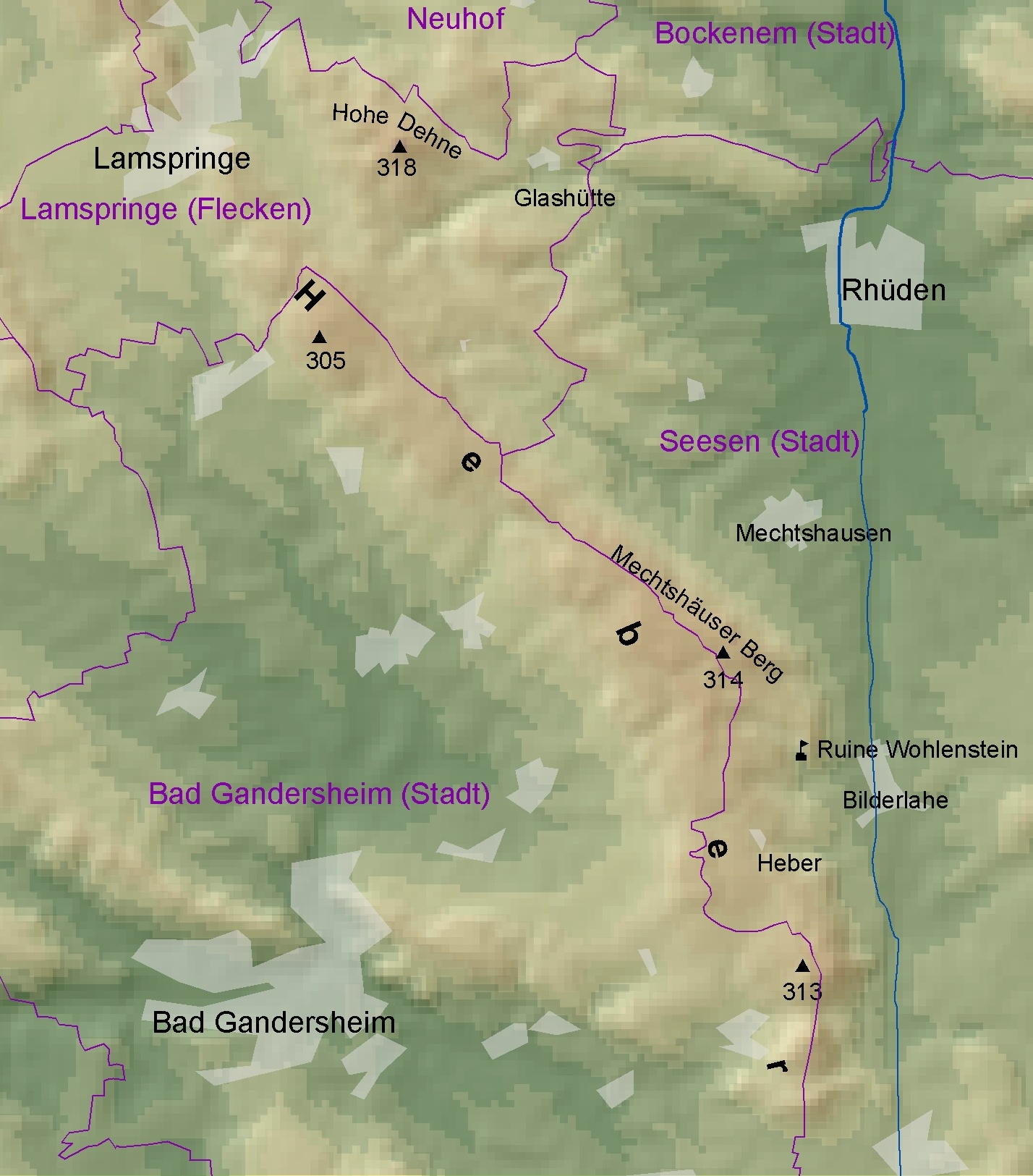 Übersichtskarte vom Höhenzug Heber (Höhenzug)